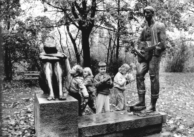 ADN-ZB-Hirndorf-18.10.1988-Erfurt: "Der Gitarrenspieler und sein lauschendes Mädchen" im Erfurter Dreibrunnenpark interessieren sich nicht dafür, welche Jahreszeit gerade an der Reihe ist."